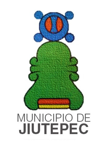 Glifo del Municipio de Jiutepec